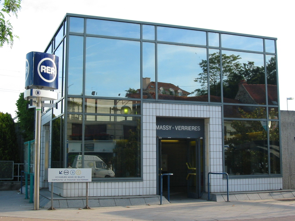 gare de Massy-Verrières (RATP), RER B, France